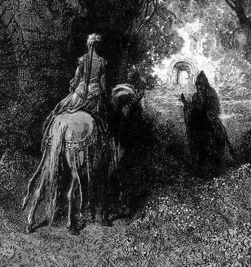 Gustave Doré’s illustration of Ludovico Ariosto’s “Orlando Furioso”.